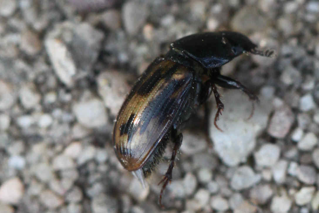 Aphodius distinctus am 4.4.2017 in der Schwetzinger Hardt